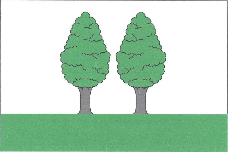 Vlajka obce Plaňany